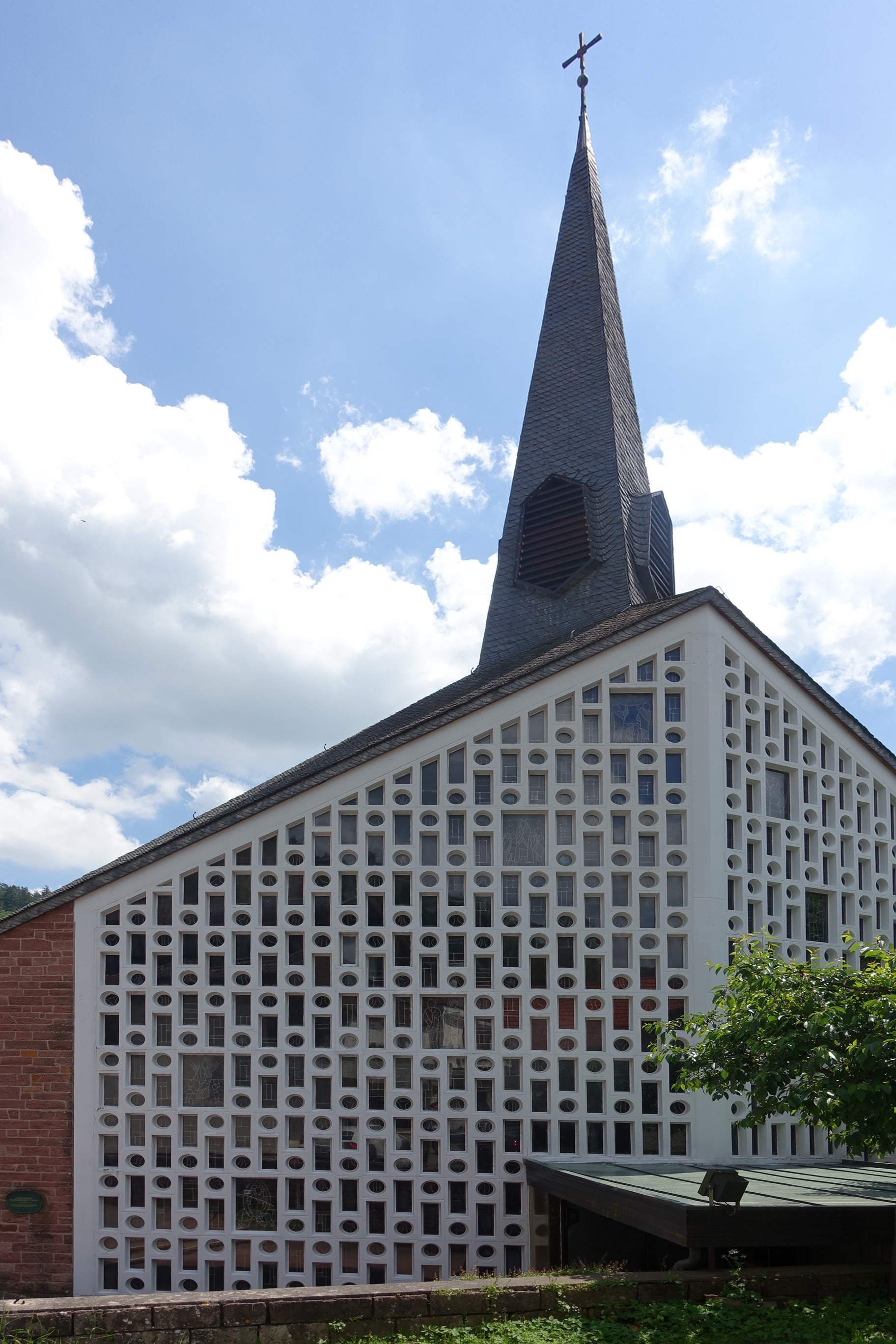 Blick auf die Kirche